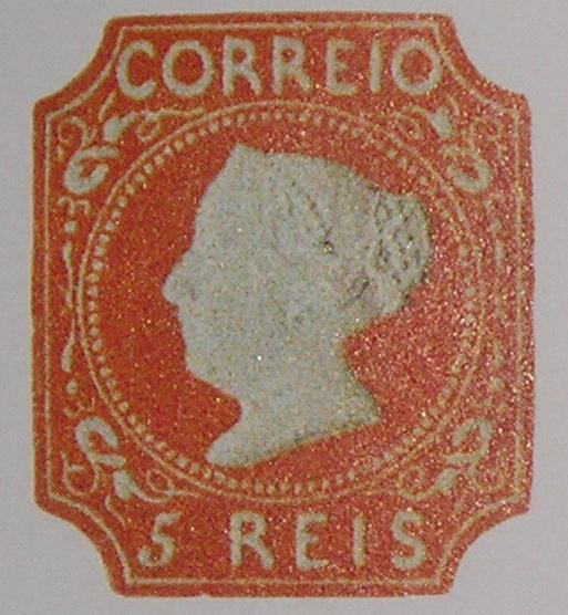 Extrait du timbre sur timbre portugais pour le 150e anniversaire du premier timbre de ce pays. N'a été conservé que l'image du timbre original de 1853, sans les ajouts de la poste portugaise en 2003, qui est dans le domaine public.